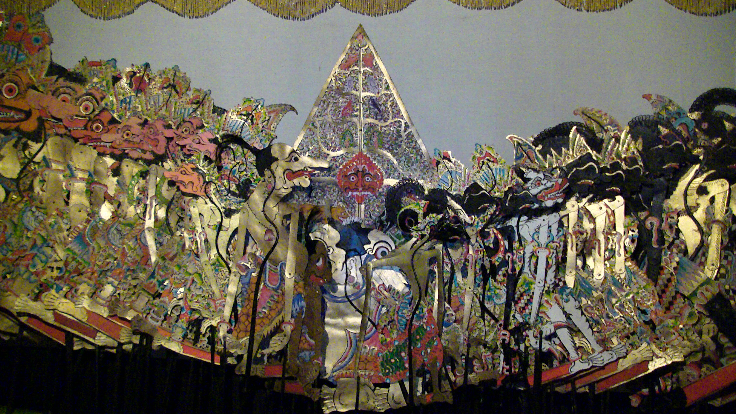 wayang kulit lit